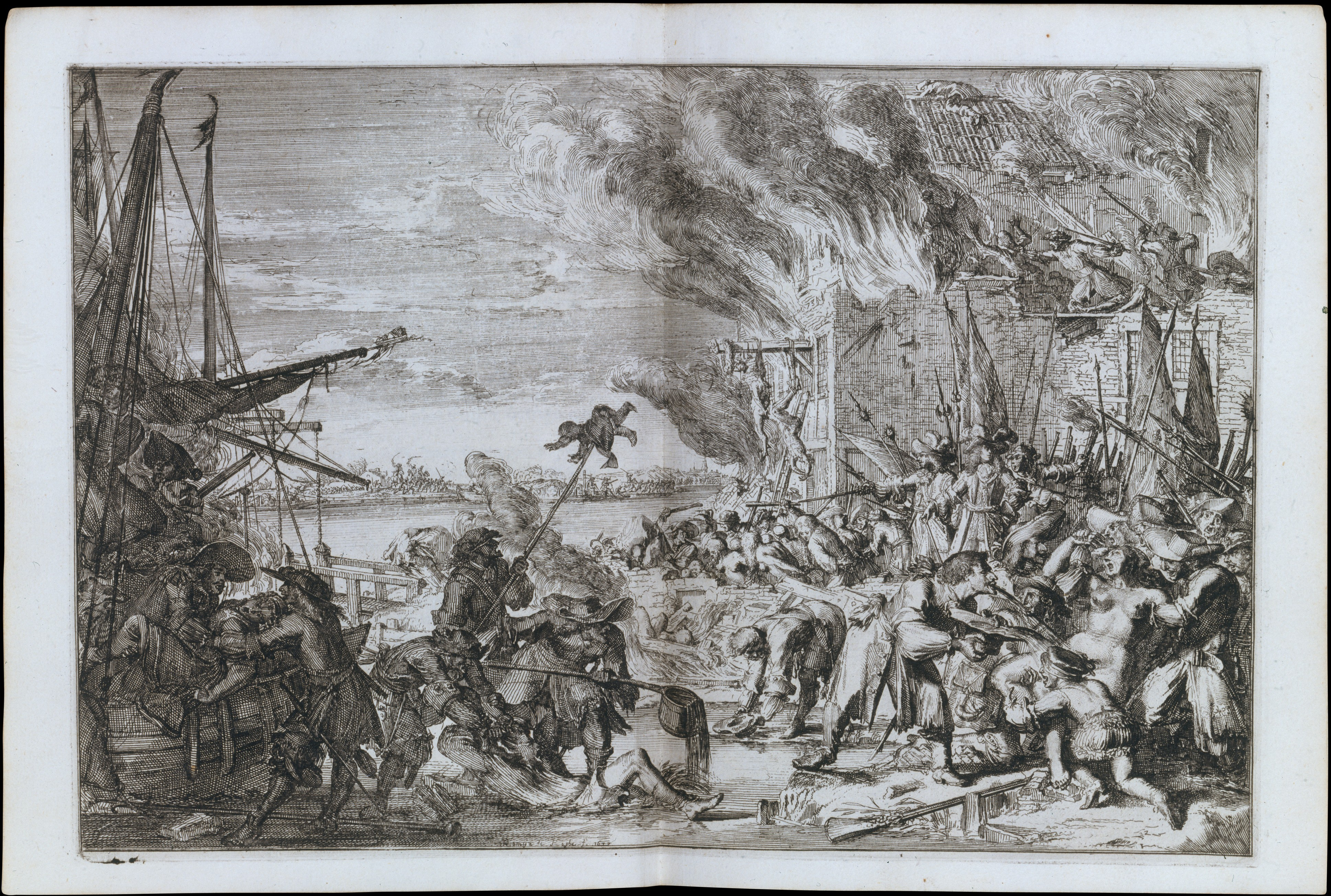 Book; Books